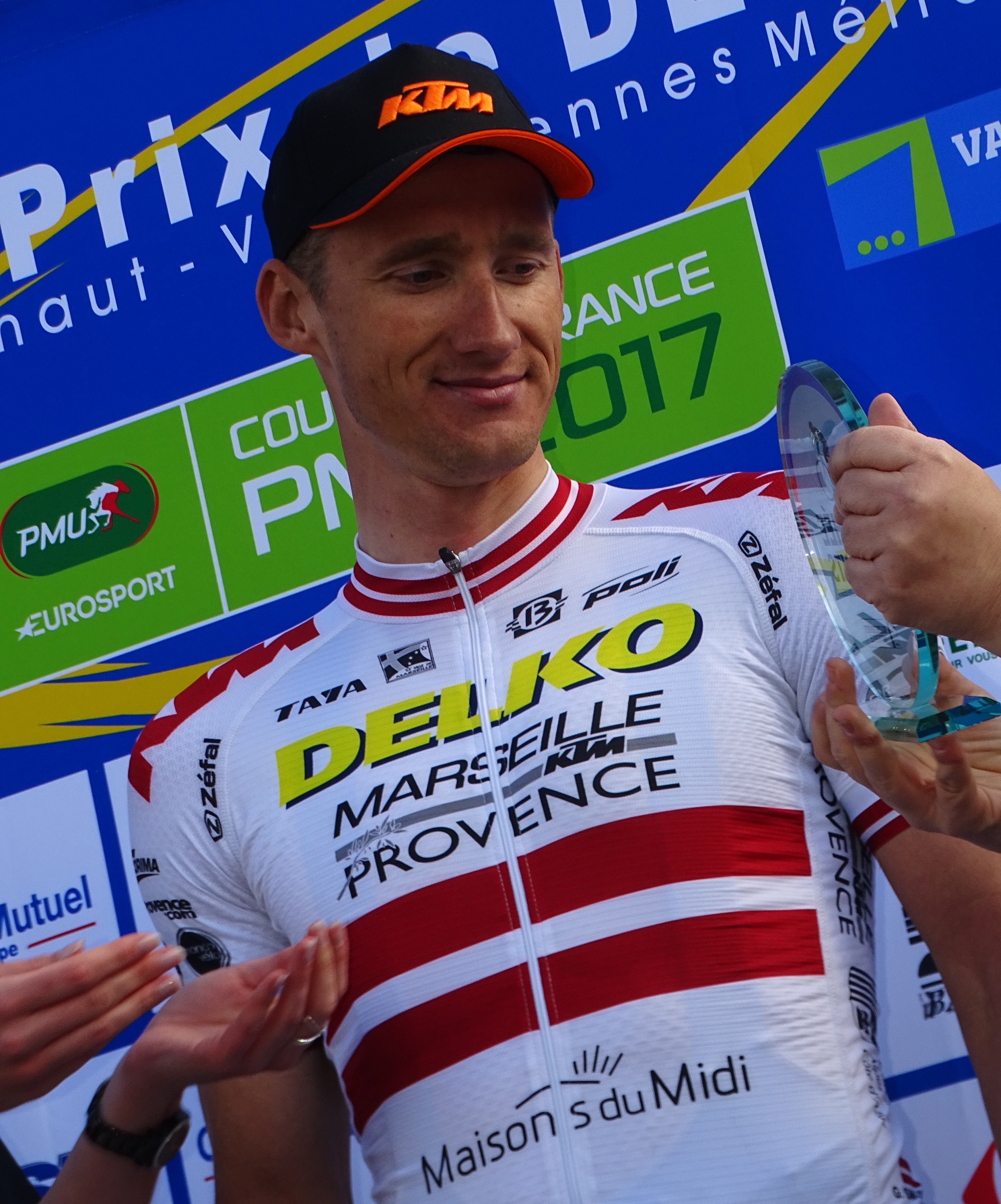 Reportage réalisé le jeudi 13 avril à l'occasion du départ et de l'arrivée du Grand Prix de Denain 2017 à Denain, Nord, Nord-Pas-de-Calais-Picardie, France.